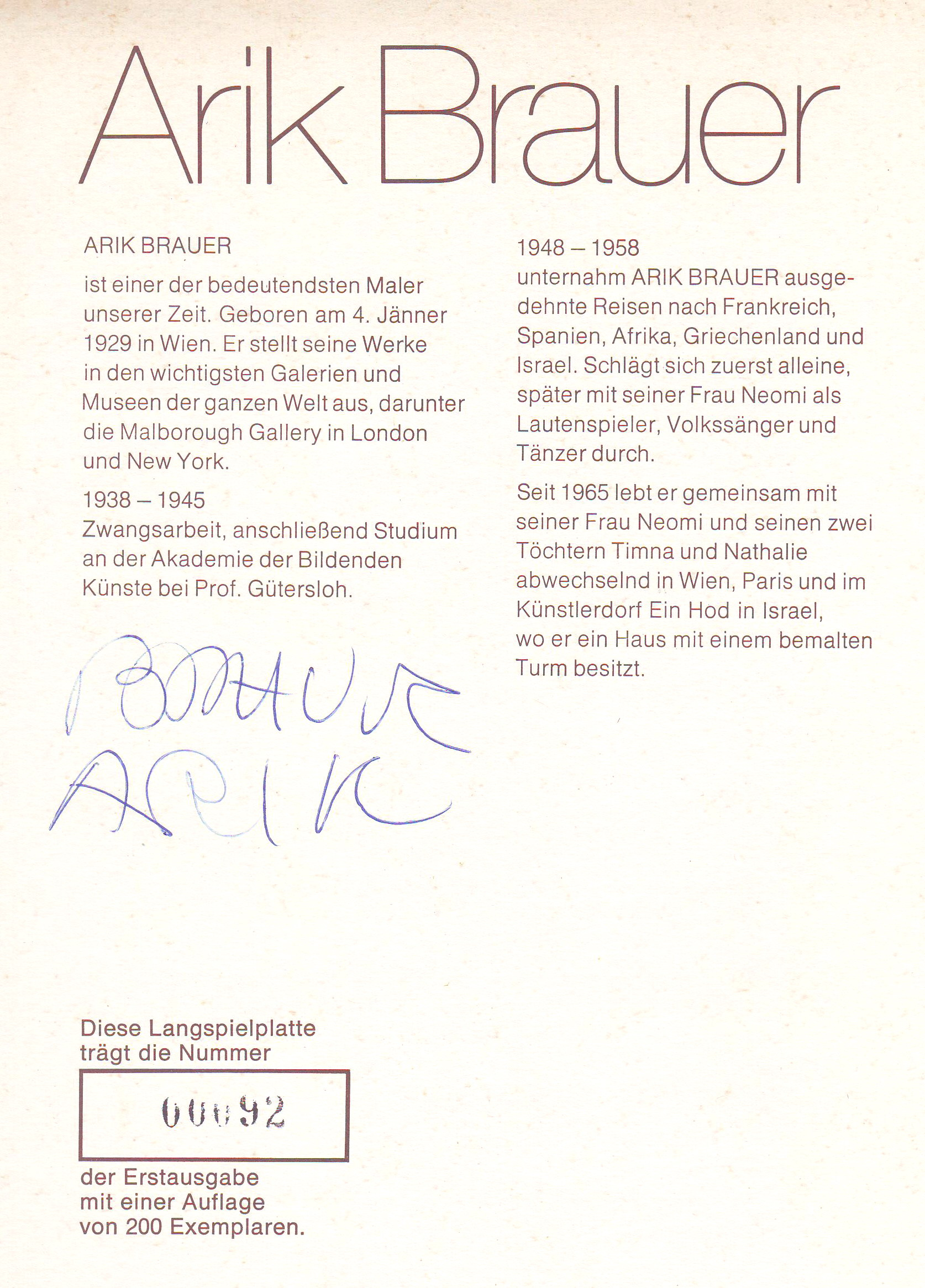 Arik Brauer - Signatur der Schallplatte Arik Brauer (1971); Original im Besitz des Autors